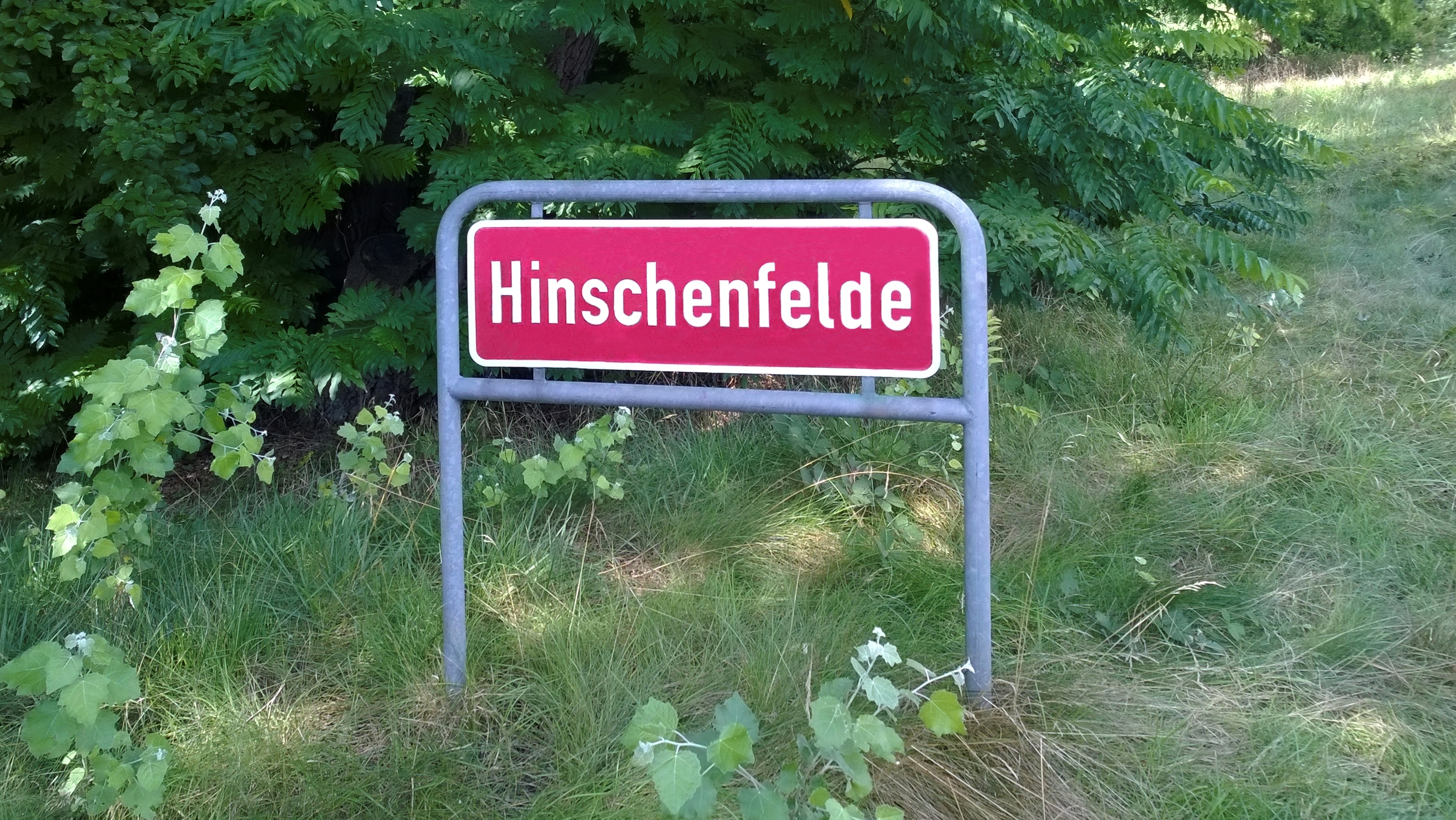 Schild des Ortsteil Hinschenfelde des Stadtteil Wandsbek im Bezirk Wandsbek in Hamburg